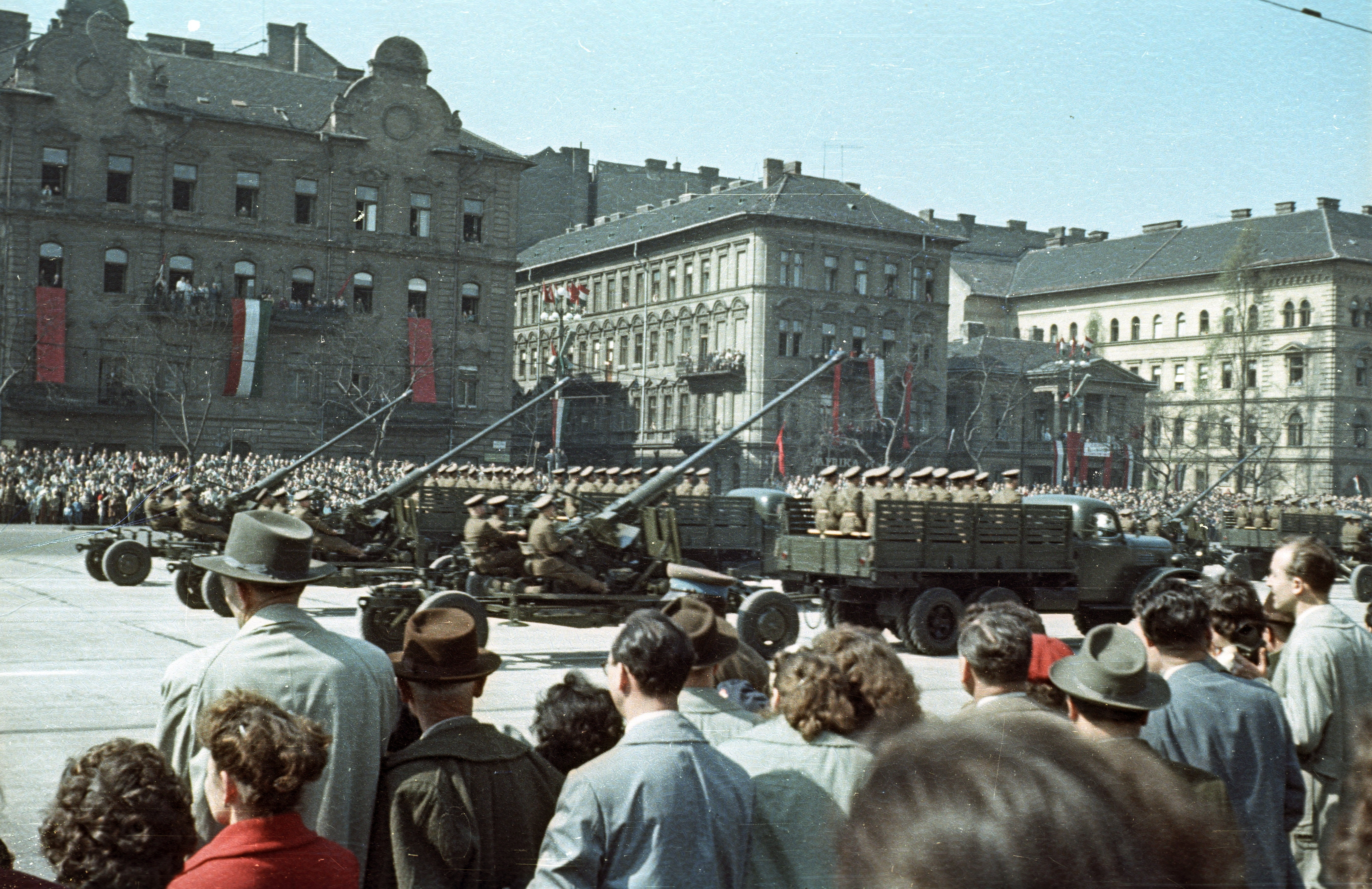 április 4-i katonai díszszemle, háttérben a Dózsa György út házai a Peterdy utca magasságában. Location: Hungary, Budapest XIV. Tags: colorful, parade, military, commercial vehicle, cannon, flag, audience, ordnance, April 4 celebration, Budapest Title: április 4-i katonai díszszemle, háttérben a Dózsa György út házai a Peterdy utca magasságában.